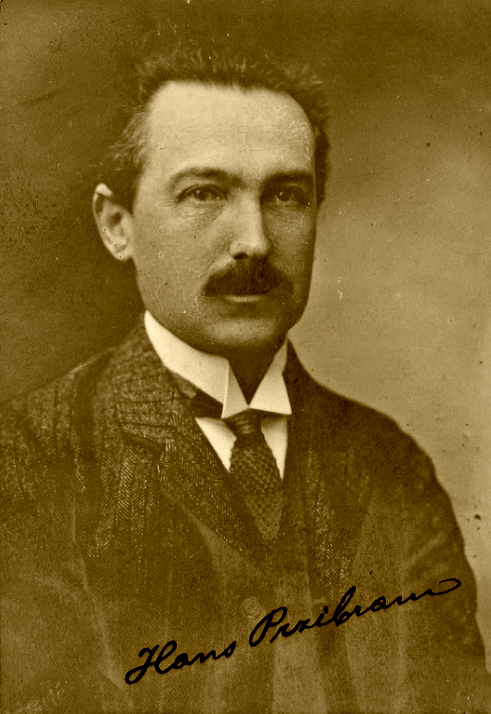 תצלום דיוקנו של פרופסור הנס פשיברם: הדפס כסף, שחור לבן, 6X9 ס"מ. על התצלום, כנראה חתימת ידו של פשיברם, בדיו. בגב התצלום, נכתבו בדיו, בגרמנית, קורות חייו של פשיברם, כנראה על ידי יצחק רובינסון, אשר מעזבונו נתרם דיוקן זה לאוסף, בשנת 1935.